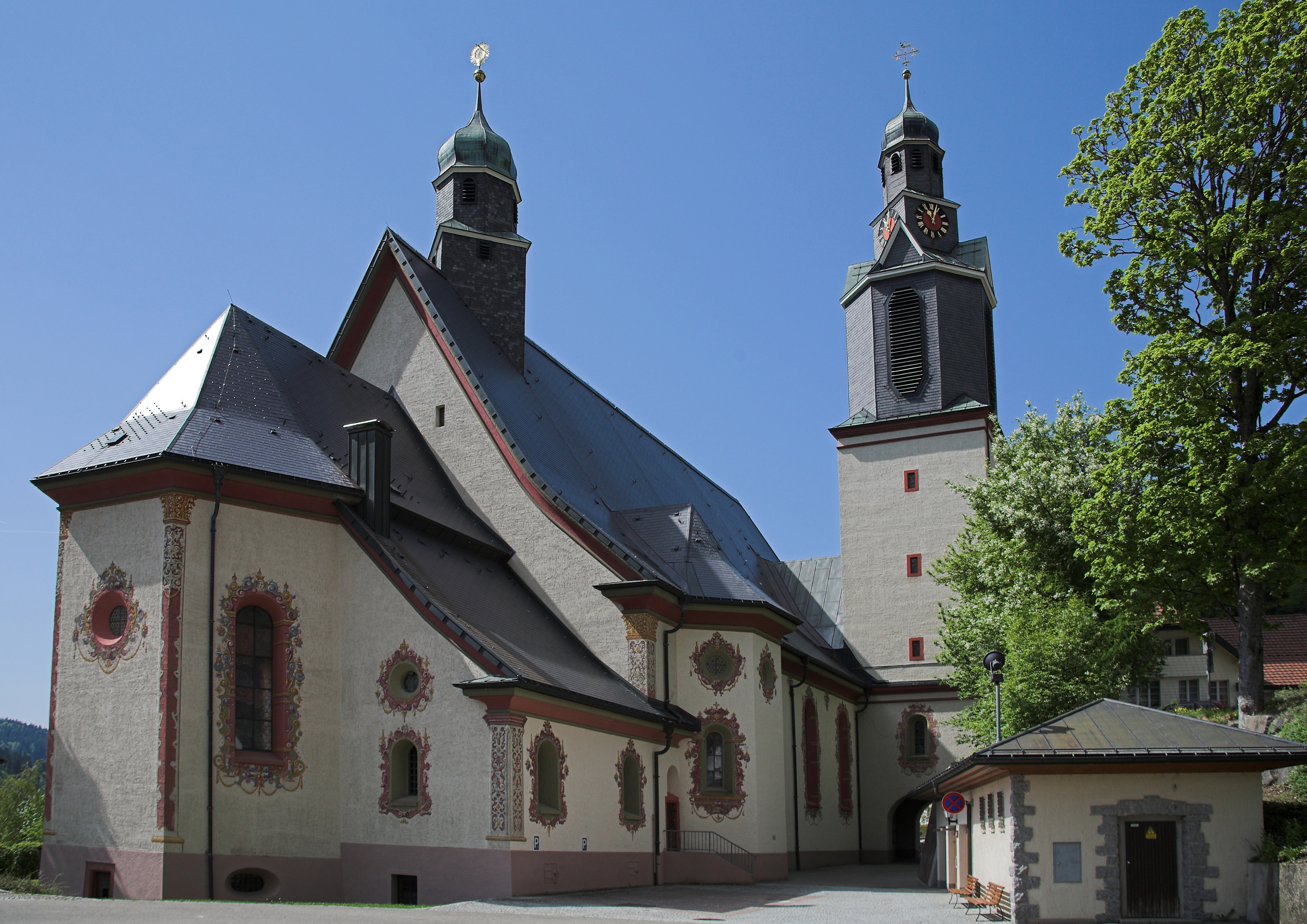 Nordansicht der Wallfahrtskirche in Todtmoos